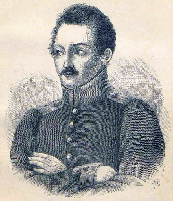 А. И. Полежаев.